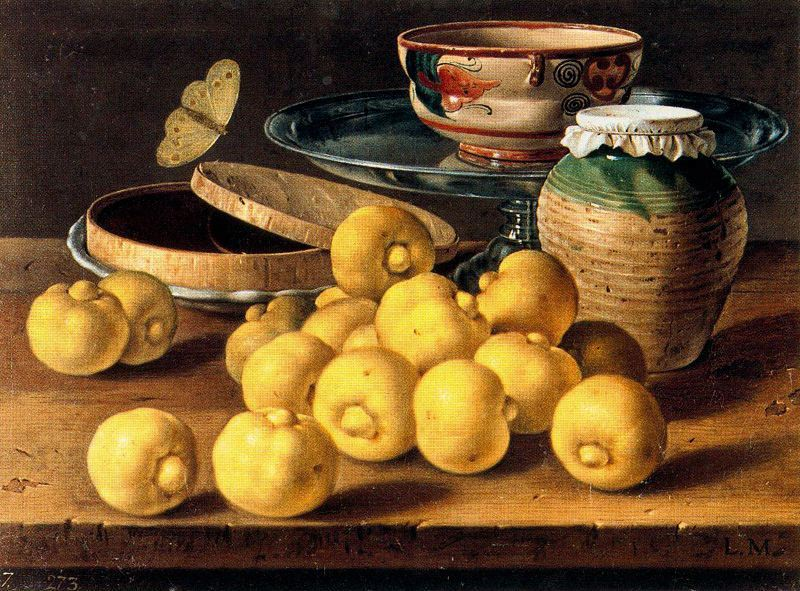 Bodegón: limas, caja de dulce y recipientes, pintura al óleo realizada por Luis Egidio Meléndez conservada en el Museo del Prado. Madrid